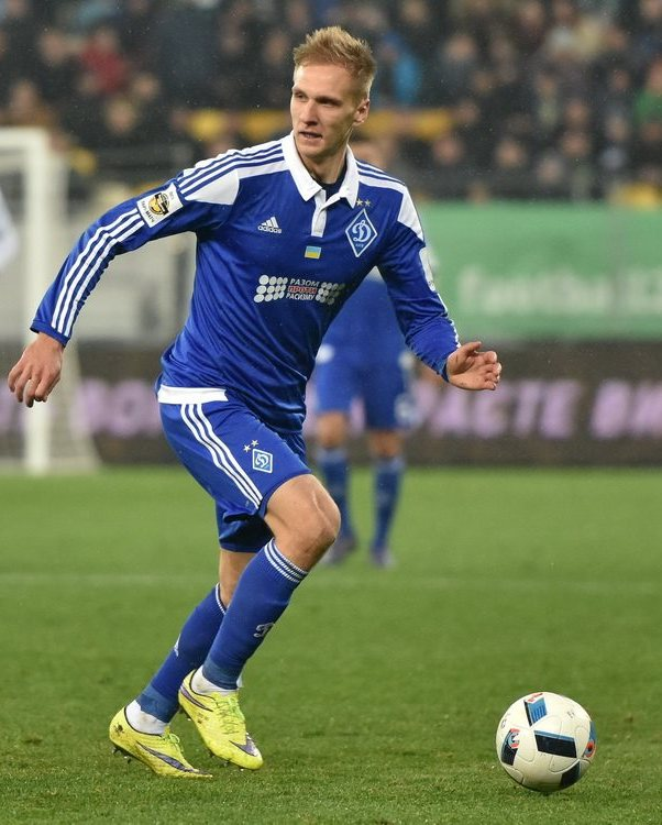 Лукаш Теодорчик - футболіст Динамо (Київ)